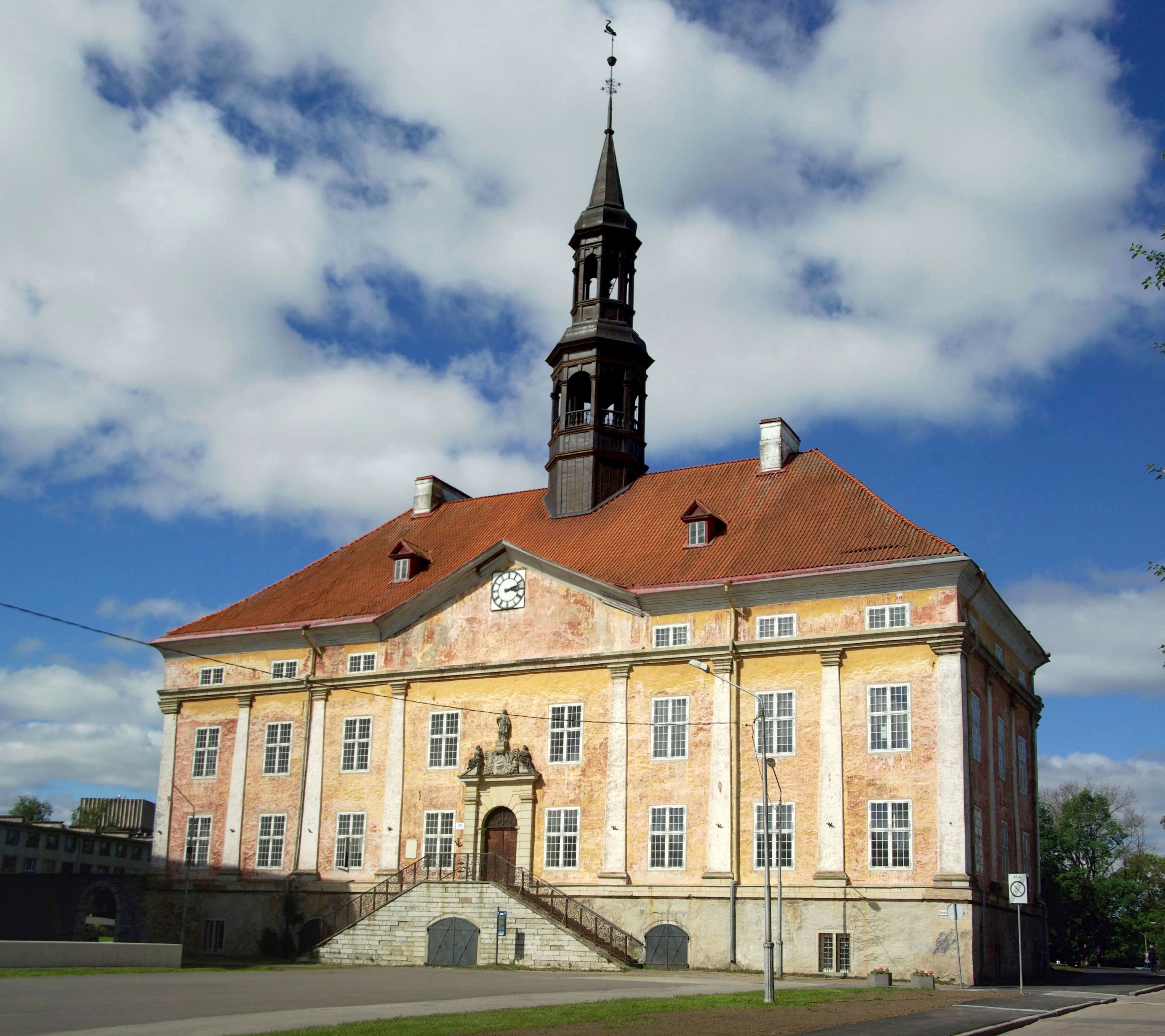 Narva raekoda